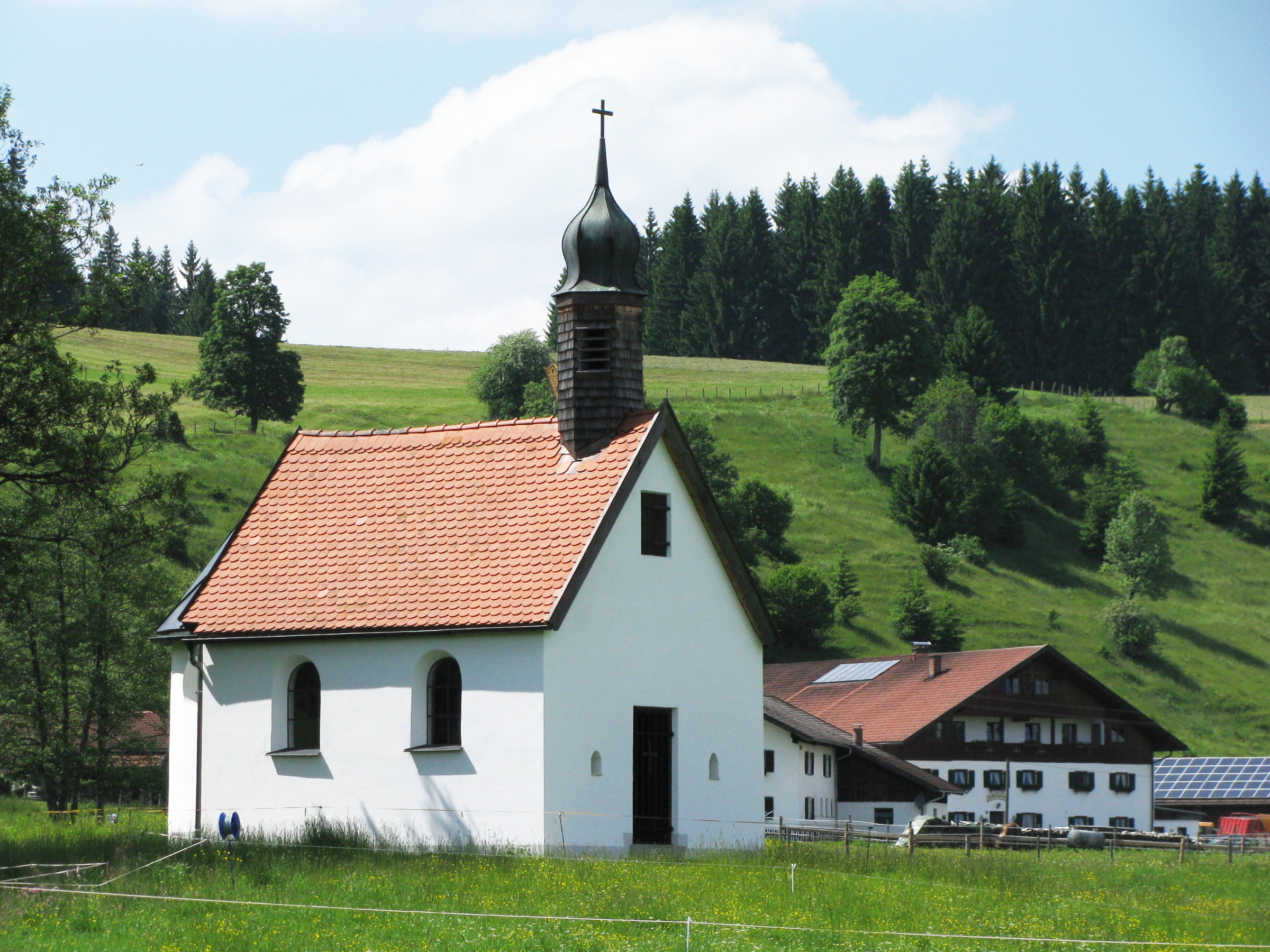 Kapelle St. Maria in Peustelsau in der Gemeinde Wildsteig.